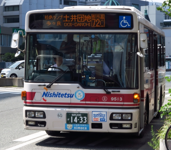 行先表示上に「都市高」と表示される